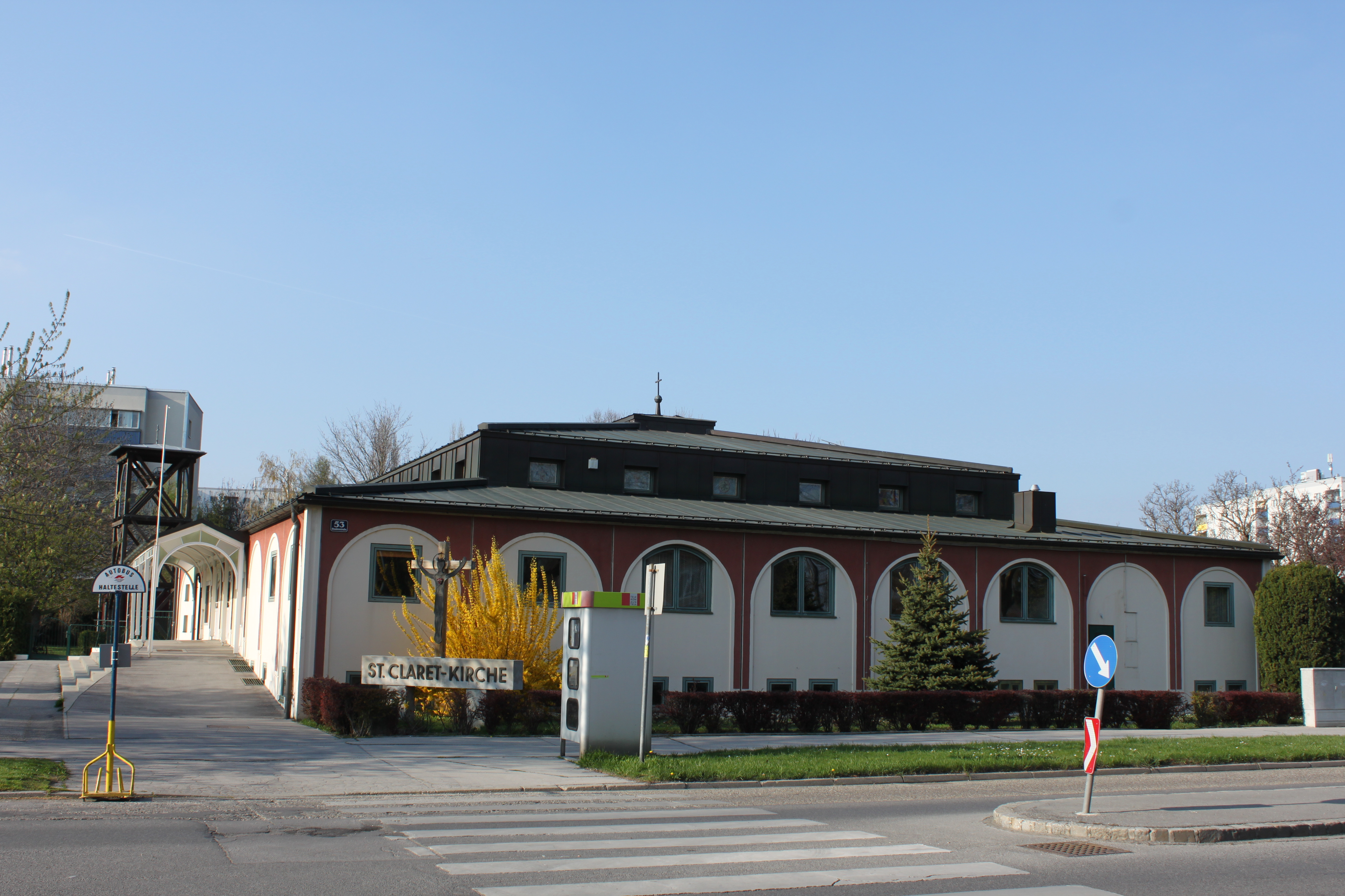 St. Claret-Ziegelhof (Wien) Object location48° 14′ 17.58″ N, 16° 28′ 52.93″ E